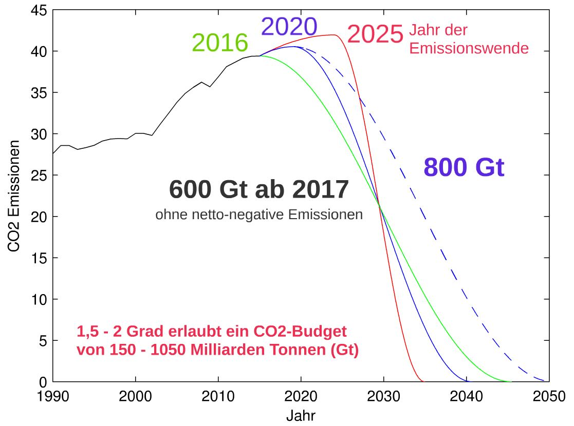 emissions pathways consistent with the Paris Agreement